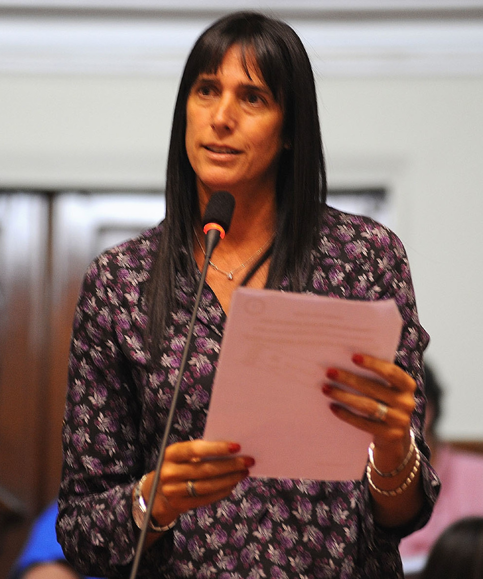 La parlamentaria Gabriela Pérez Del Solar, durante la sesión vespertina efectuada por el Pleno, en el cual fijó su posición respecto a uno de los temas en debate.